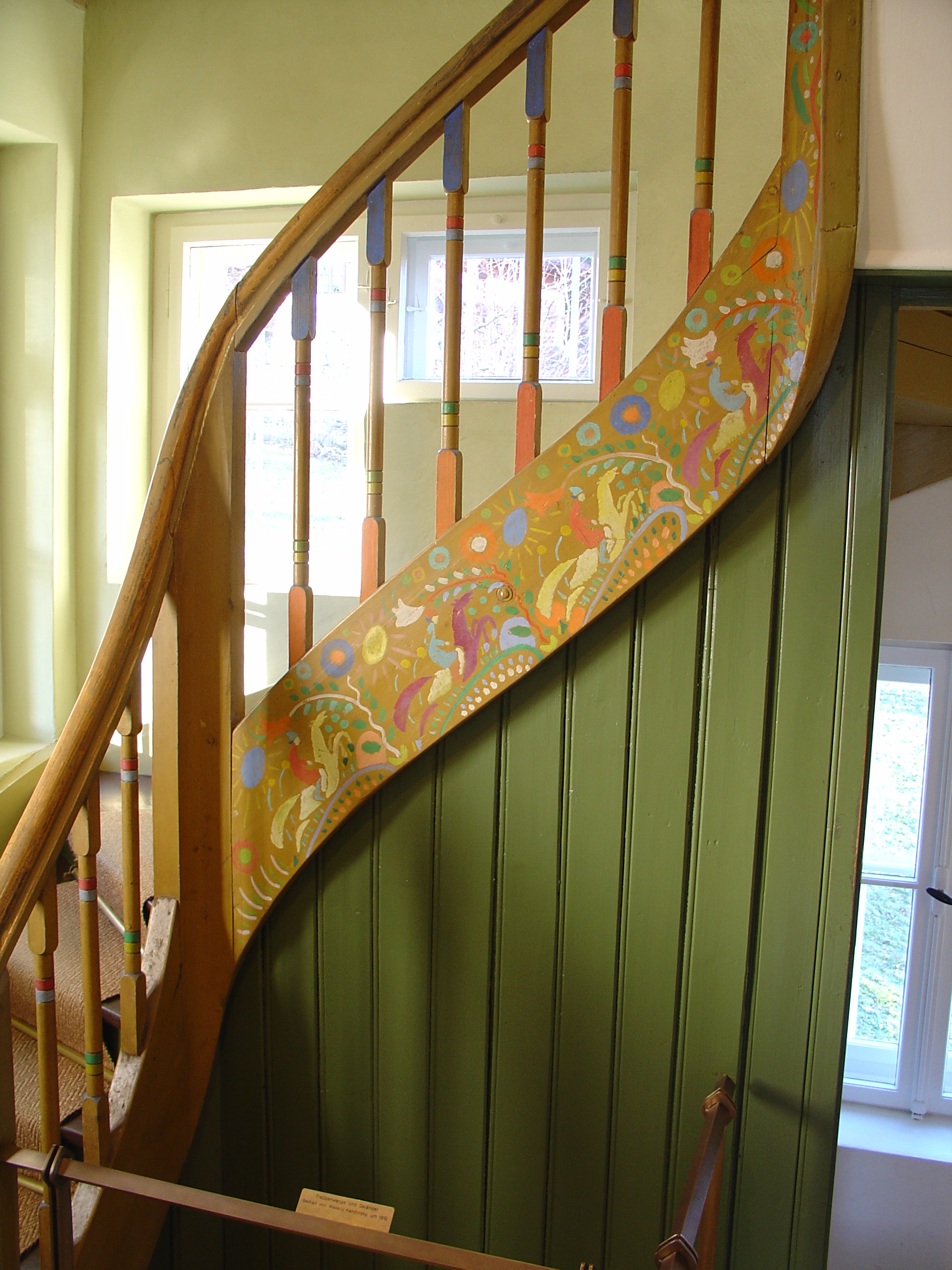 2005-01-16 Sch�ftlarn, Herzogstand, Murnau 029